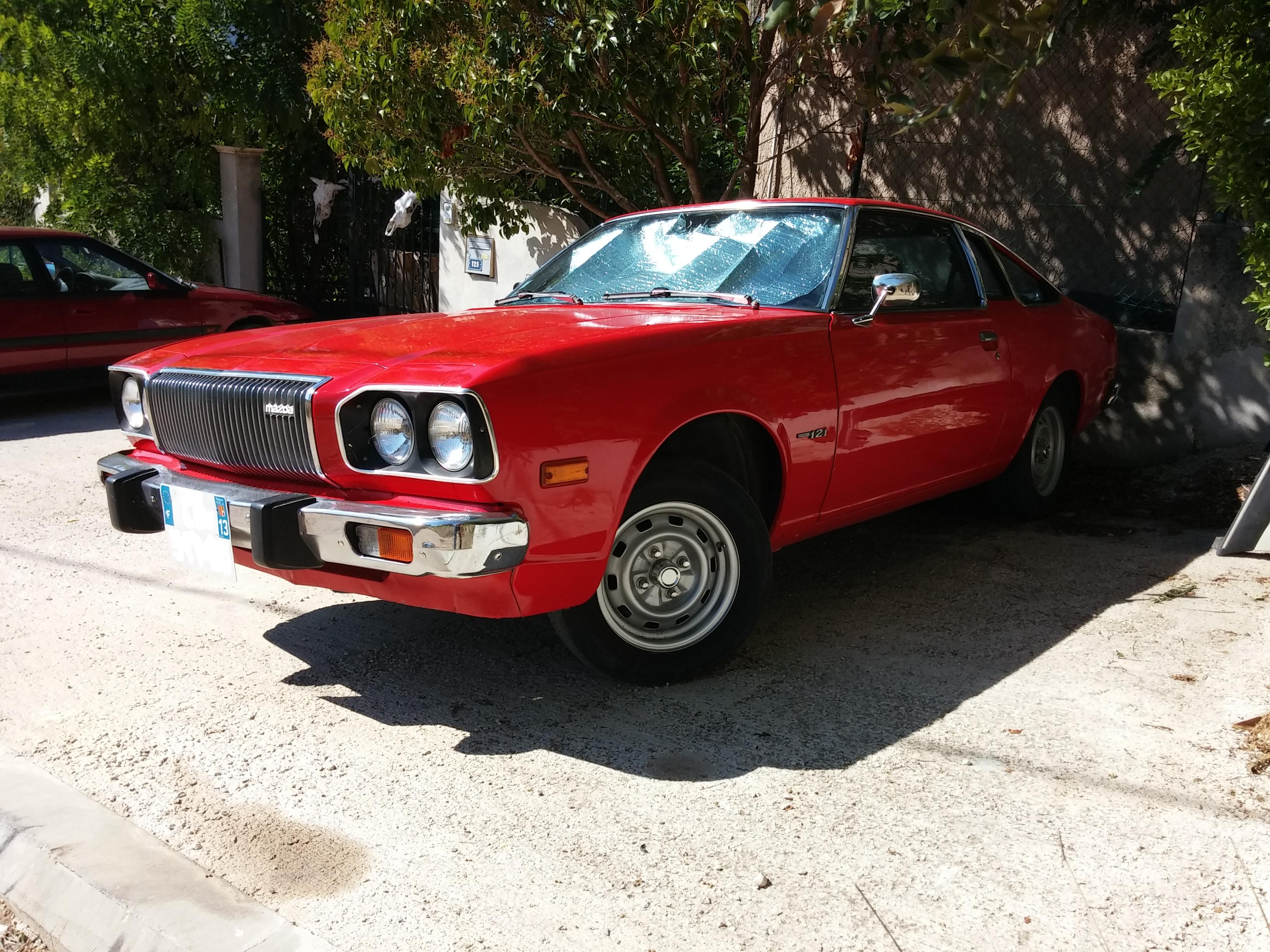 MAZDA 121 (197X - 1981)